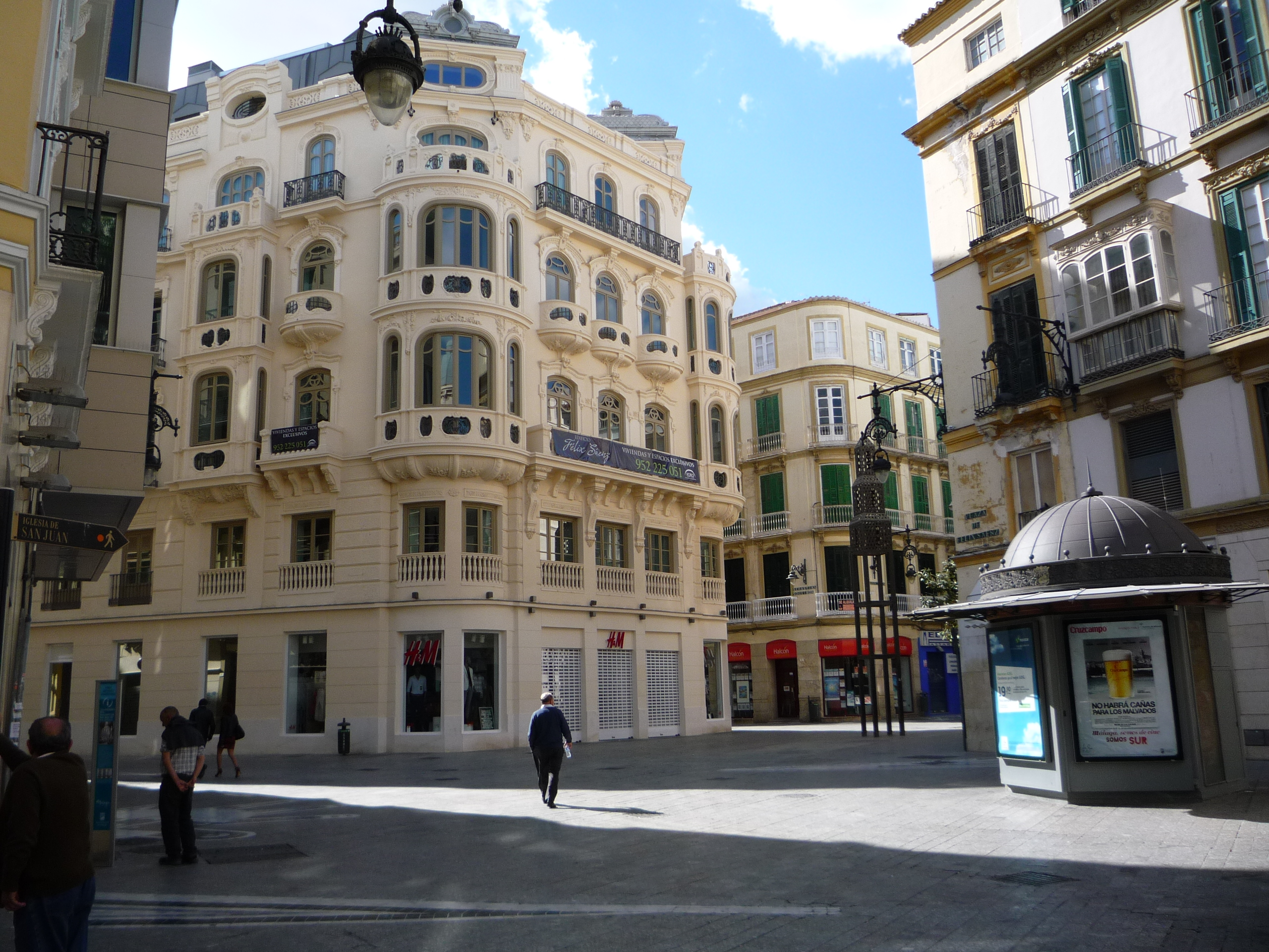 Plaza Félix Sáenz, Málaga.